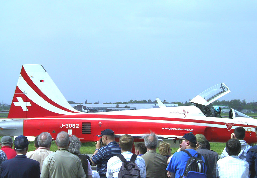 Flugschau der Patrouille Suisse auf der ILA 2002